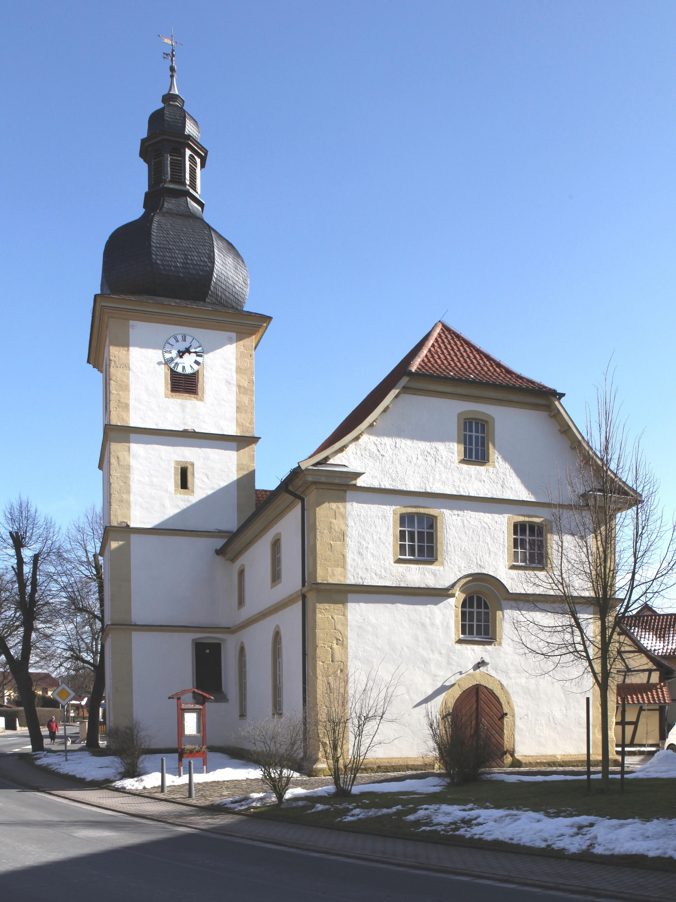 Ev. Kirche aus Anfang des 18. Jahrhunderts in Seidingstadt, OT von Straufhain, Landkreis Hildburghausen